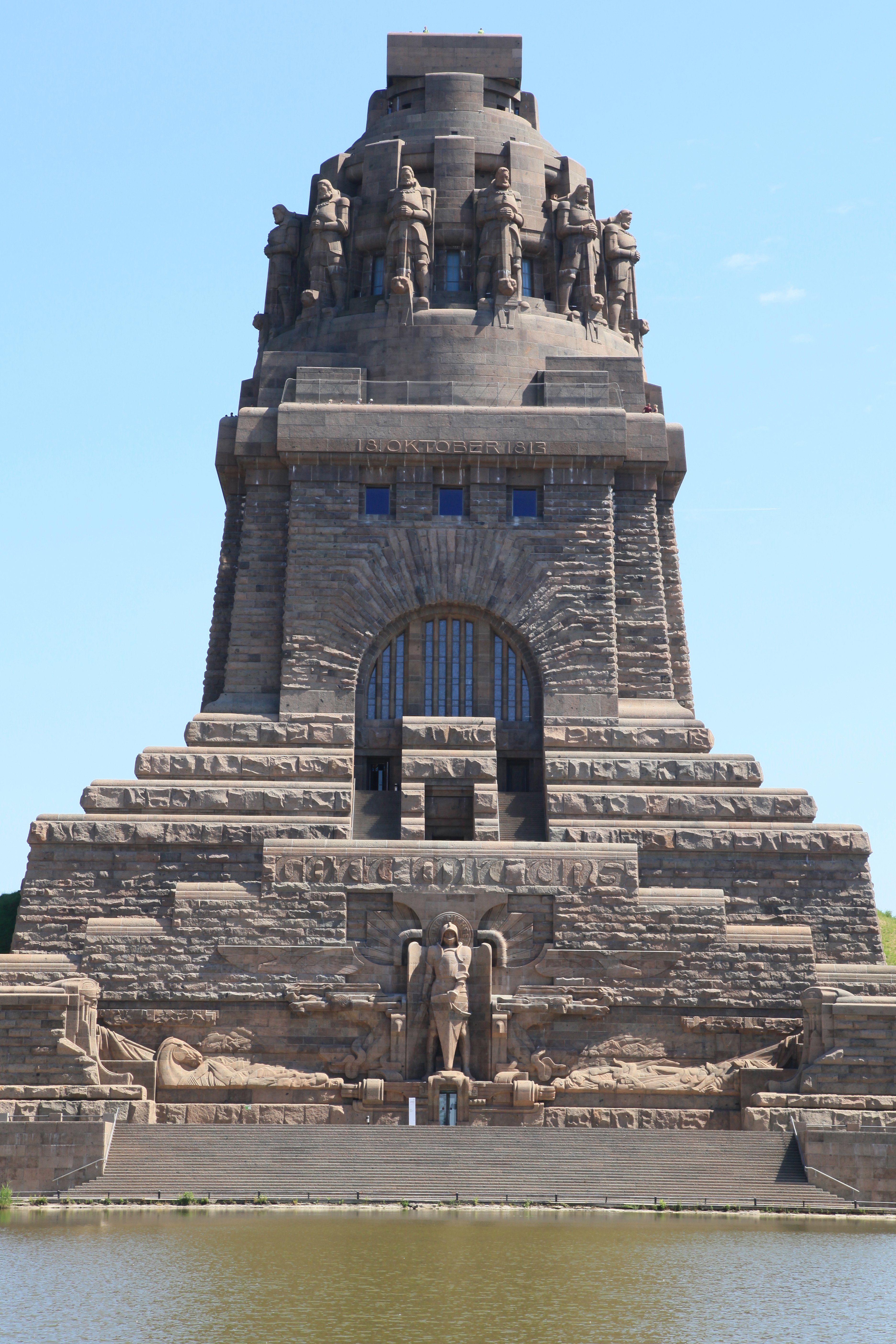 Völkerschlachtdenkmal, An der Tabaksmühle in Leipzig